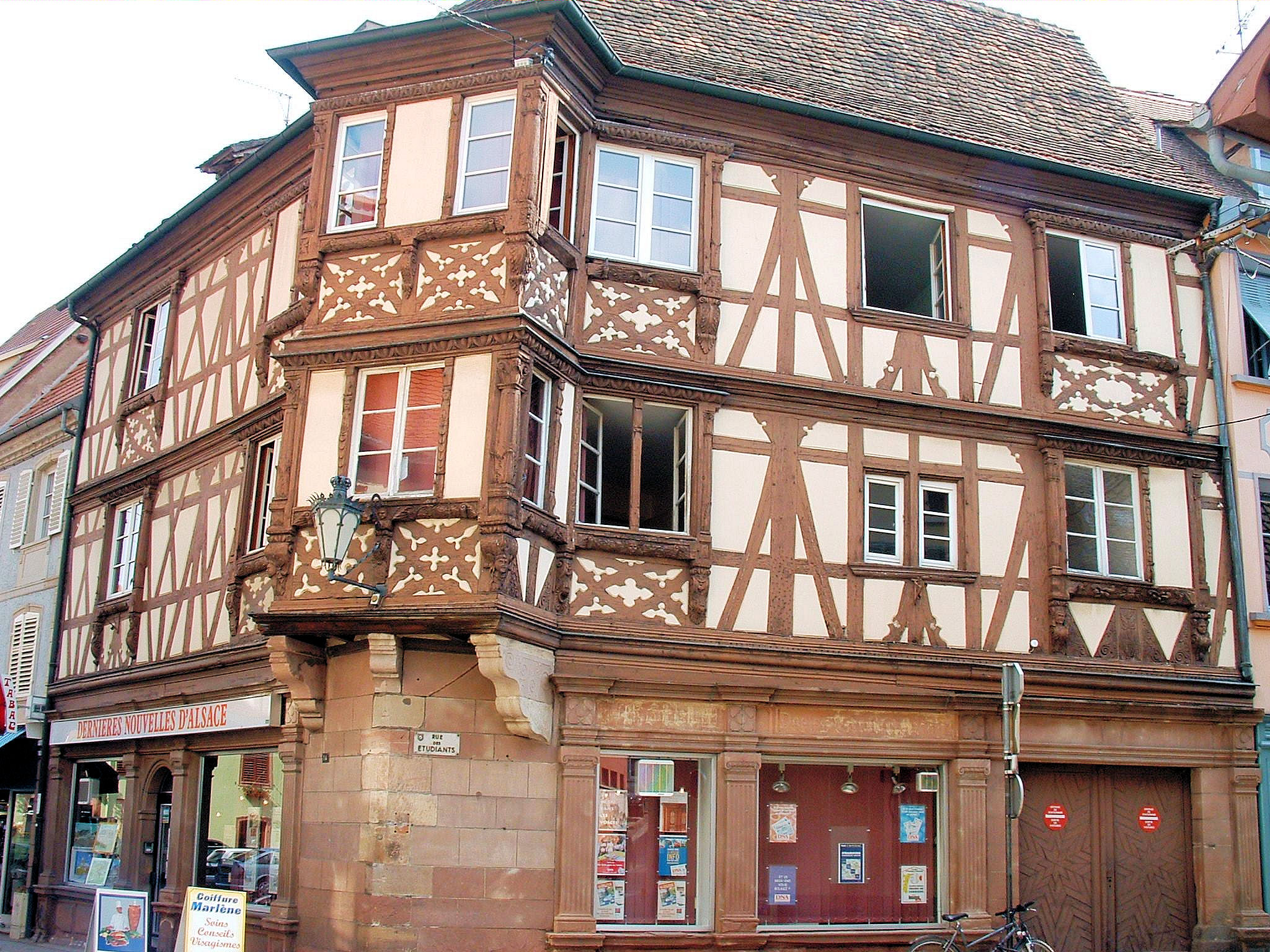 Molsheim - Ancien siège de la corporation des boulangers